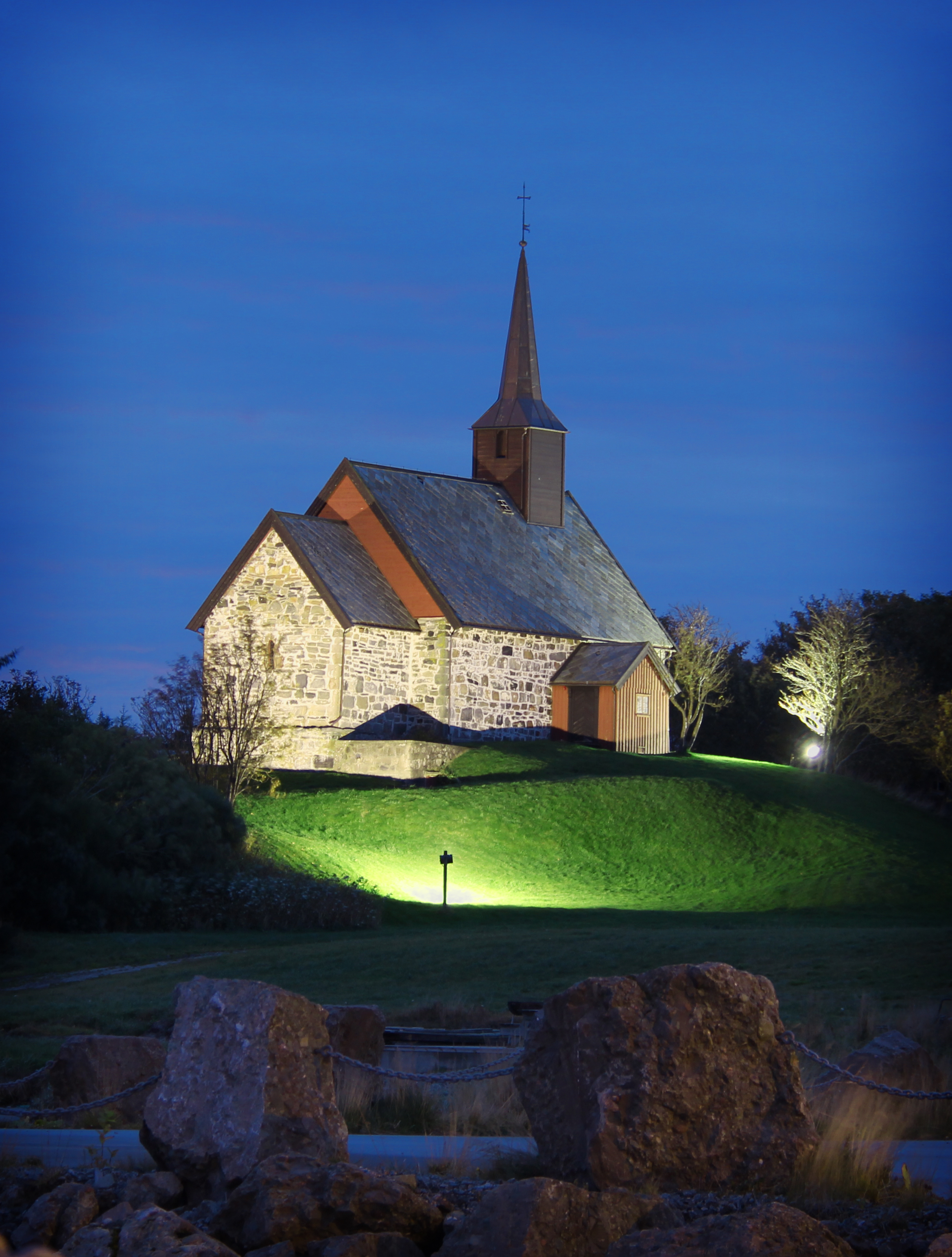 Edøy gamle kirke på Smøla i Møre og Rømsdal